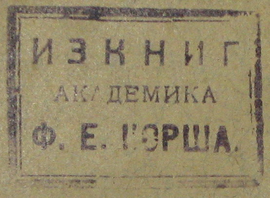 Штамп книг из собрания академика Ф. Е. Корша в Научной библиотеке МГУ